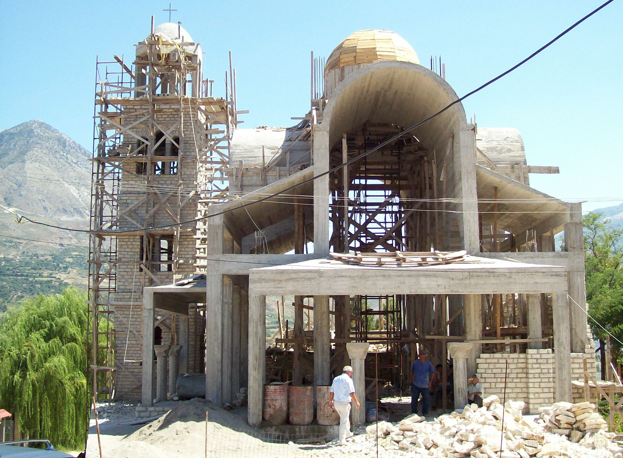 Neubau einer orthodoxen Kirche in Tepelena (August 2006)